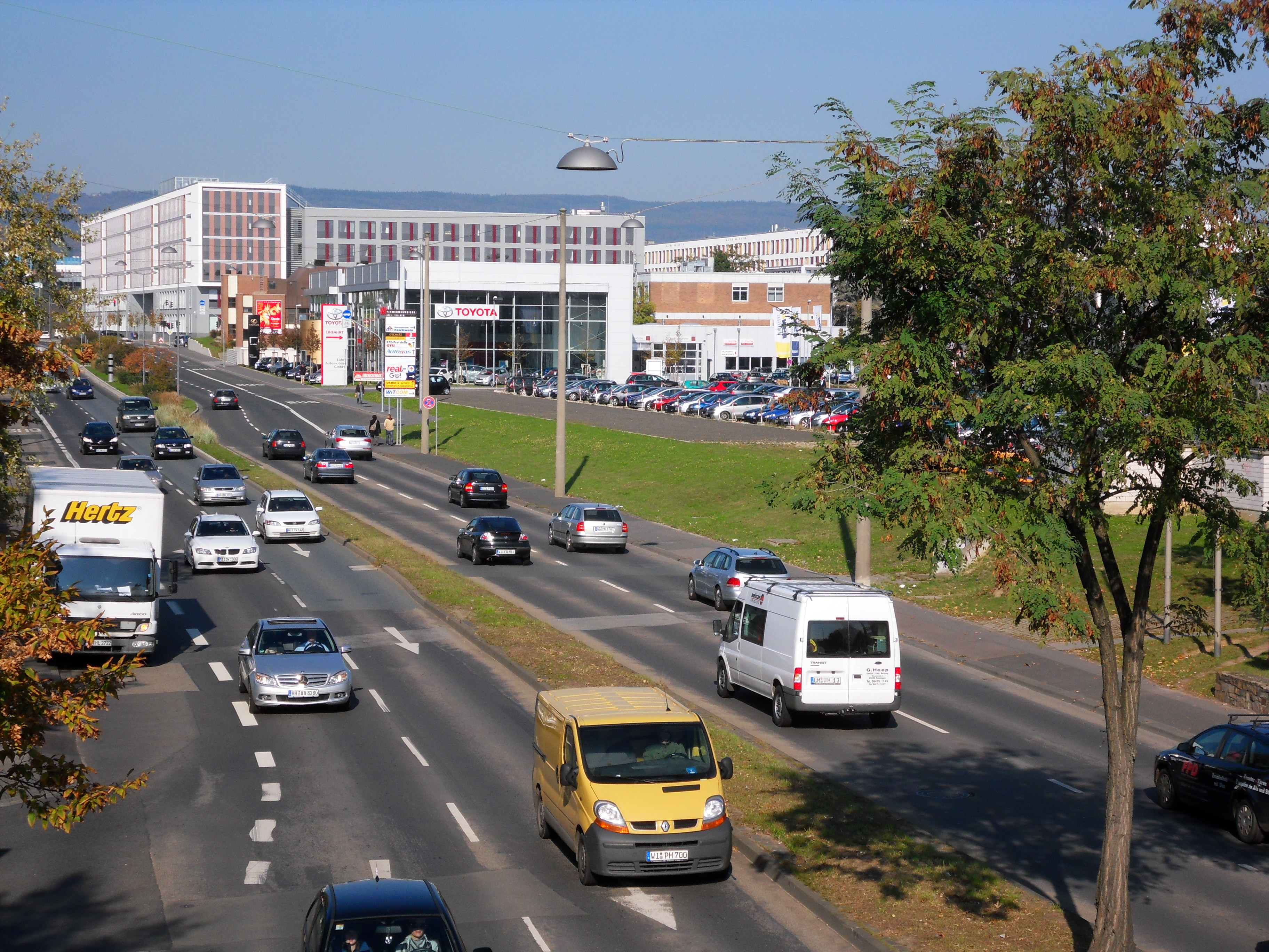 Blick von Süden über die Mainzer Straße auf das Wiesbadener Justiz- und Verwaltungszentrum (Hinter dem Autohaus)